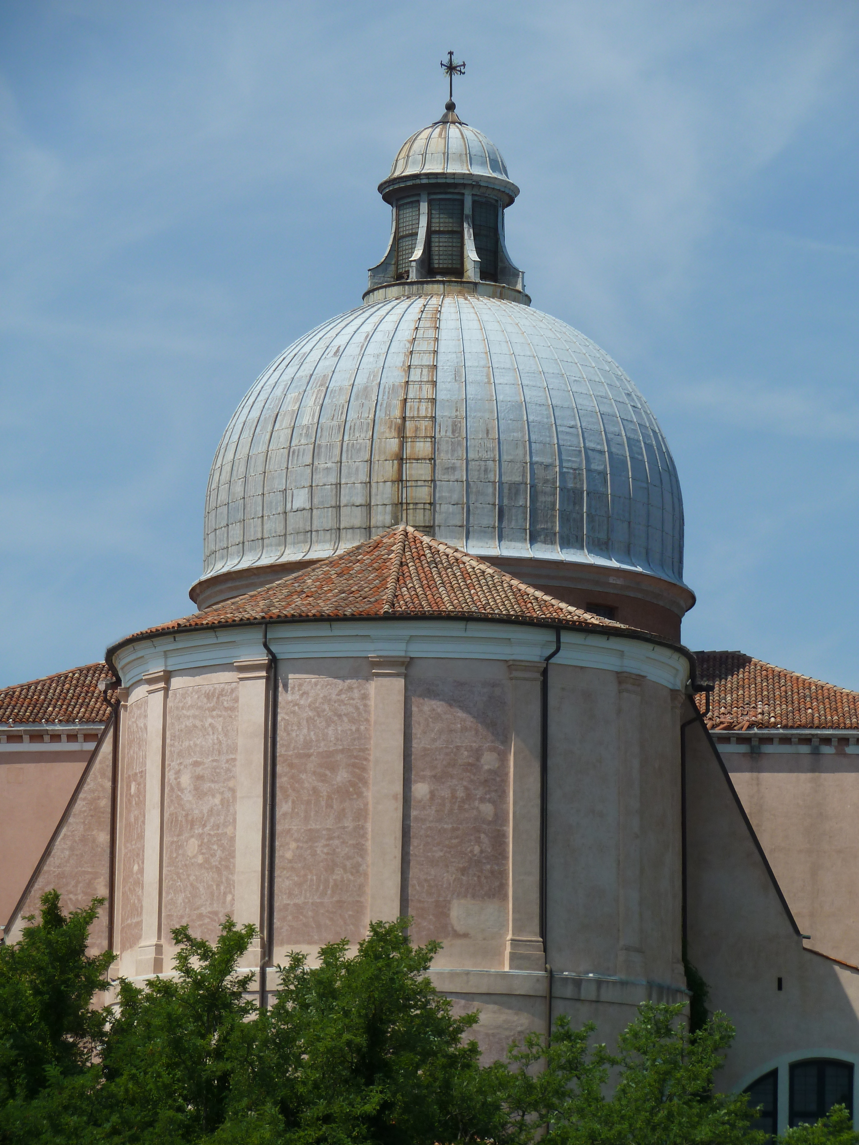 Dome s pietro castello